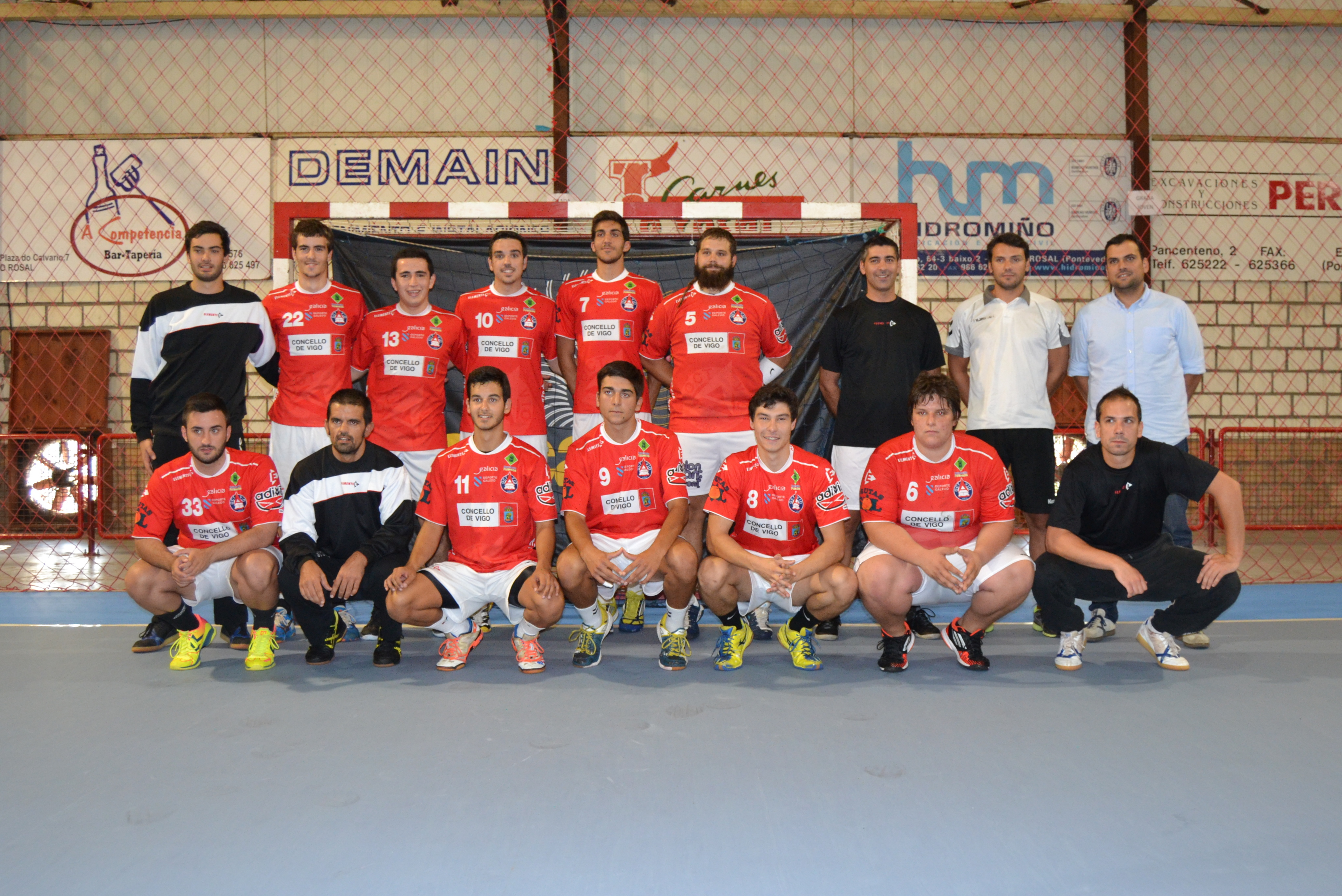 Academia Octavio no Torneo Concello do Rosal 2014.